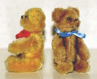 2 Schuco minibamser fra 1970'erne